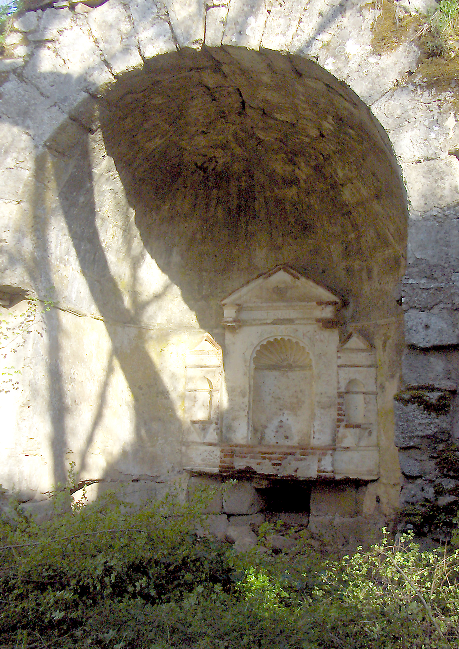 Fregenal de la Sierra (Badajoz). Ruinas de la ermita medieval de San Miguel de los Fresnos (ss. XIII-XV). Interior del ábside.